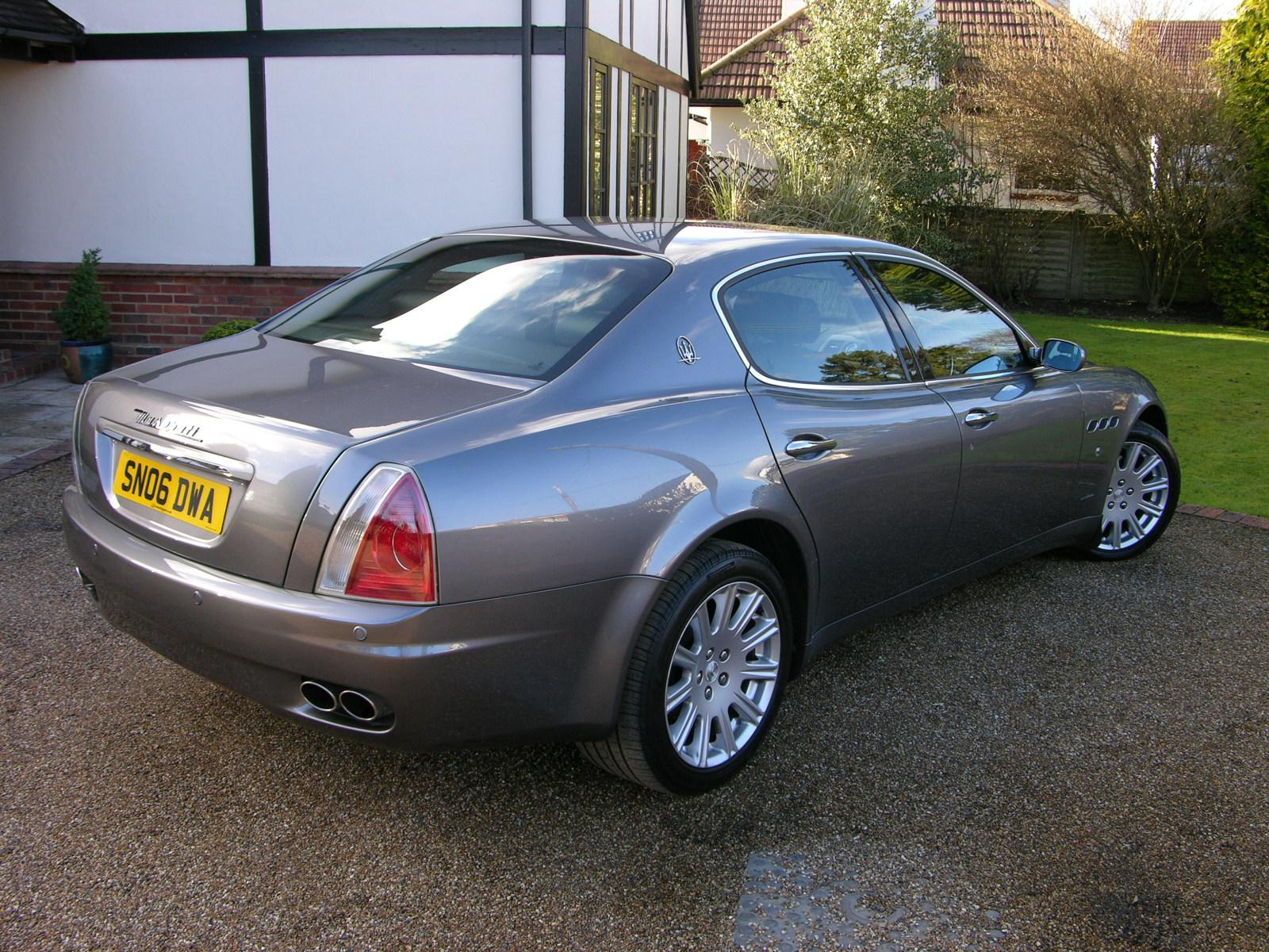 2006 Maserati Quattroporte